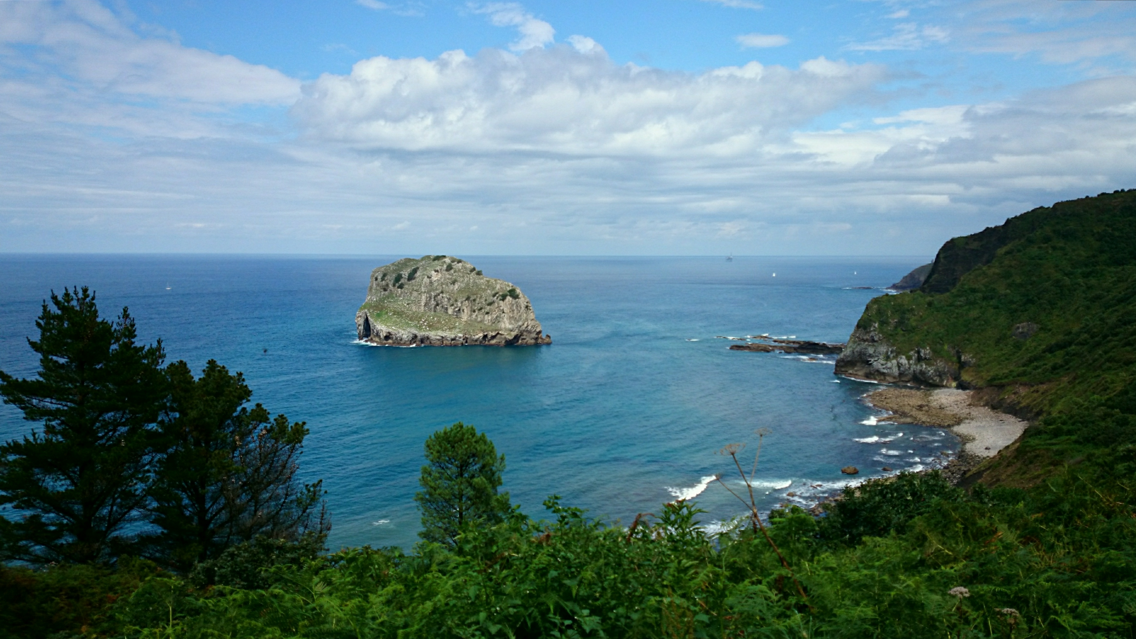 Isla Aketz This is a photography of a Special Area of Conservation in Spain with the ID: ES2130005. Natura2000 entry, EEA entry